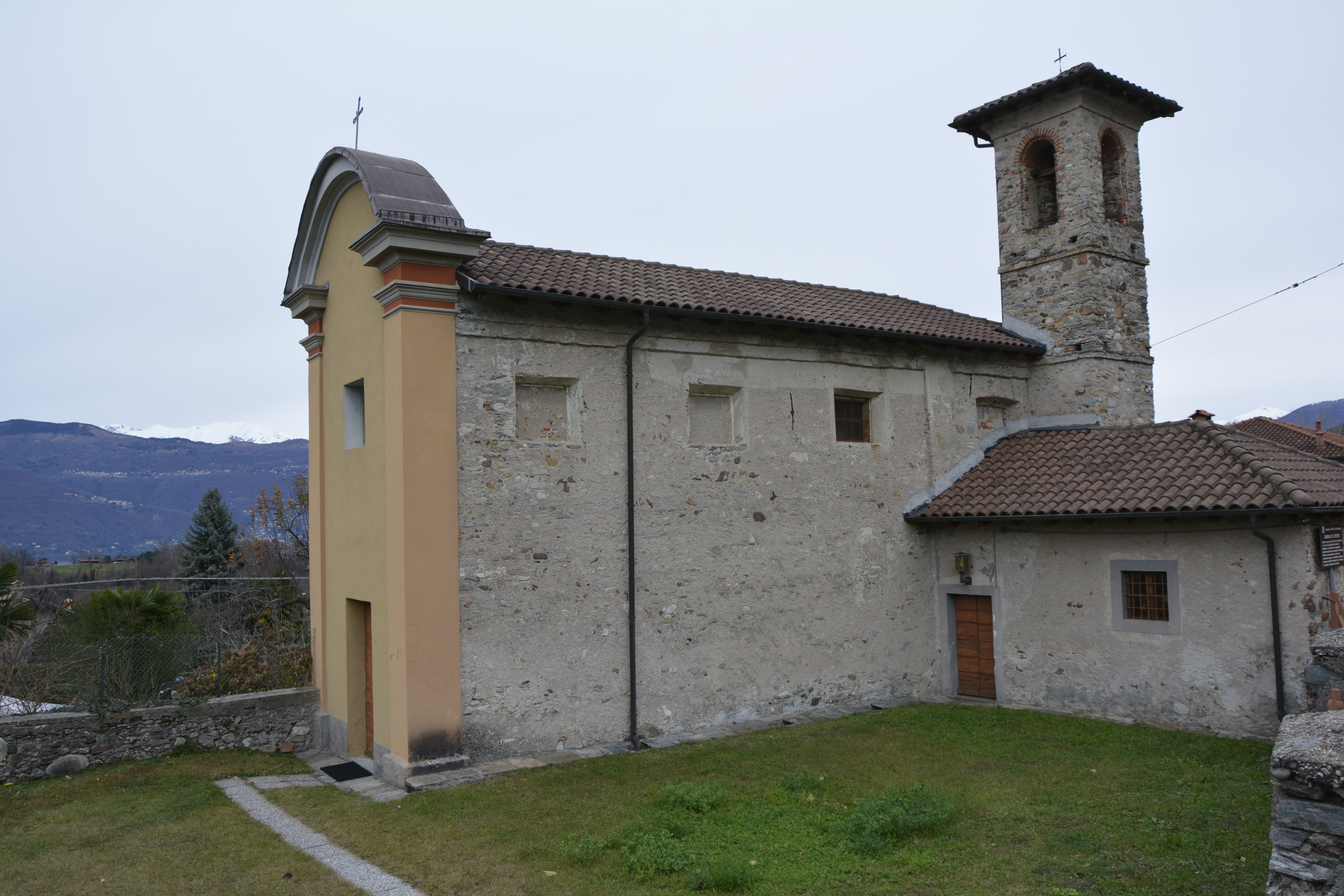 La chiesa di San Pietro e Santa Maria Immacolata in località Musadino a Porto Valtravaglia, in provincia di Varese.